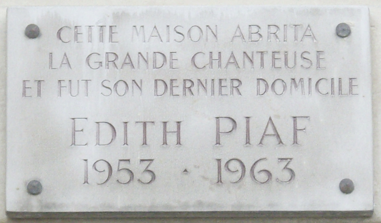 Plaque commémorative, 67 boulevard Lannes, Paris 16e. « Cette maison abrita la grande chanteuse et fut son dernier domicile. Édith Piaf. 1953-1963. »